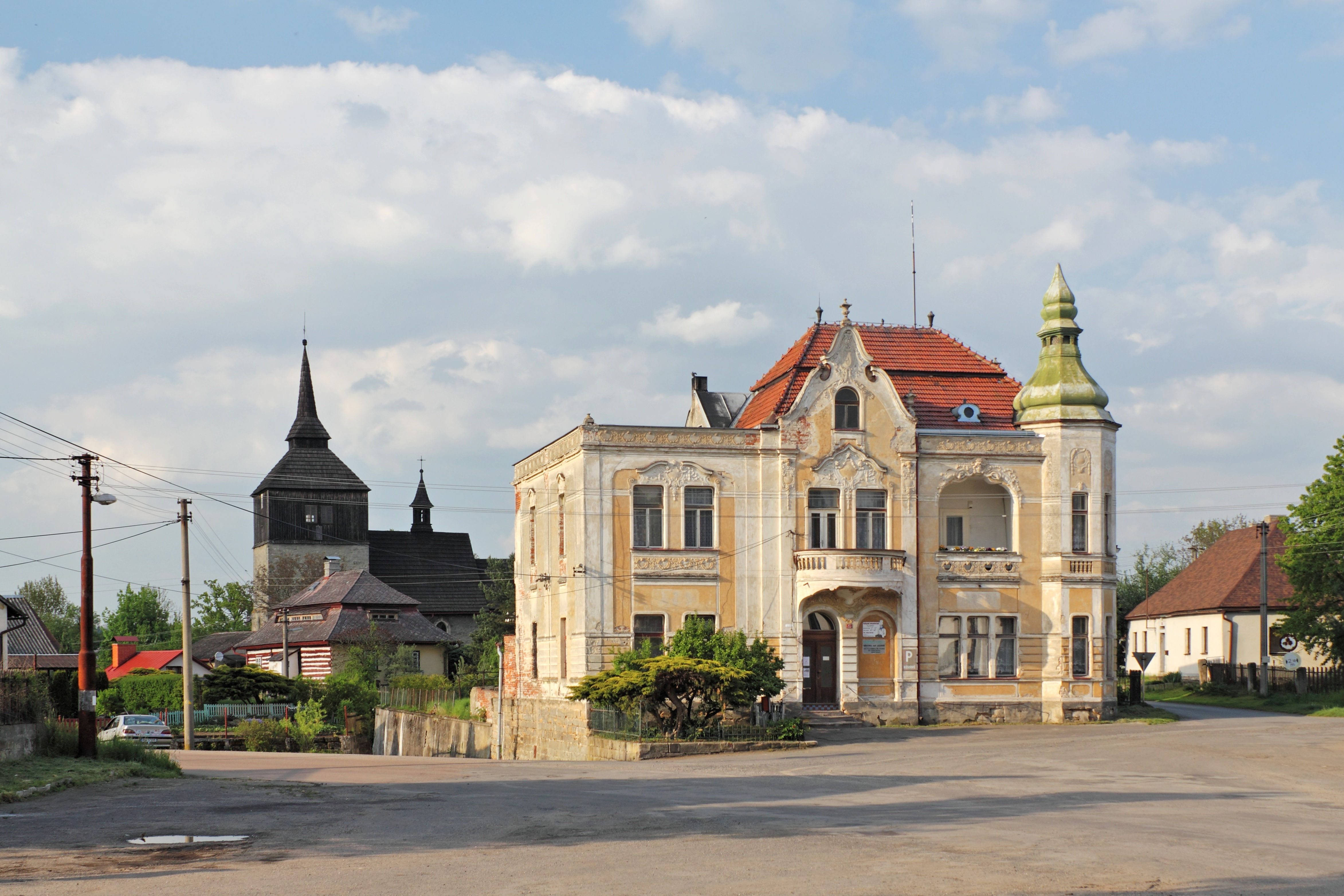 Březina 41